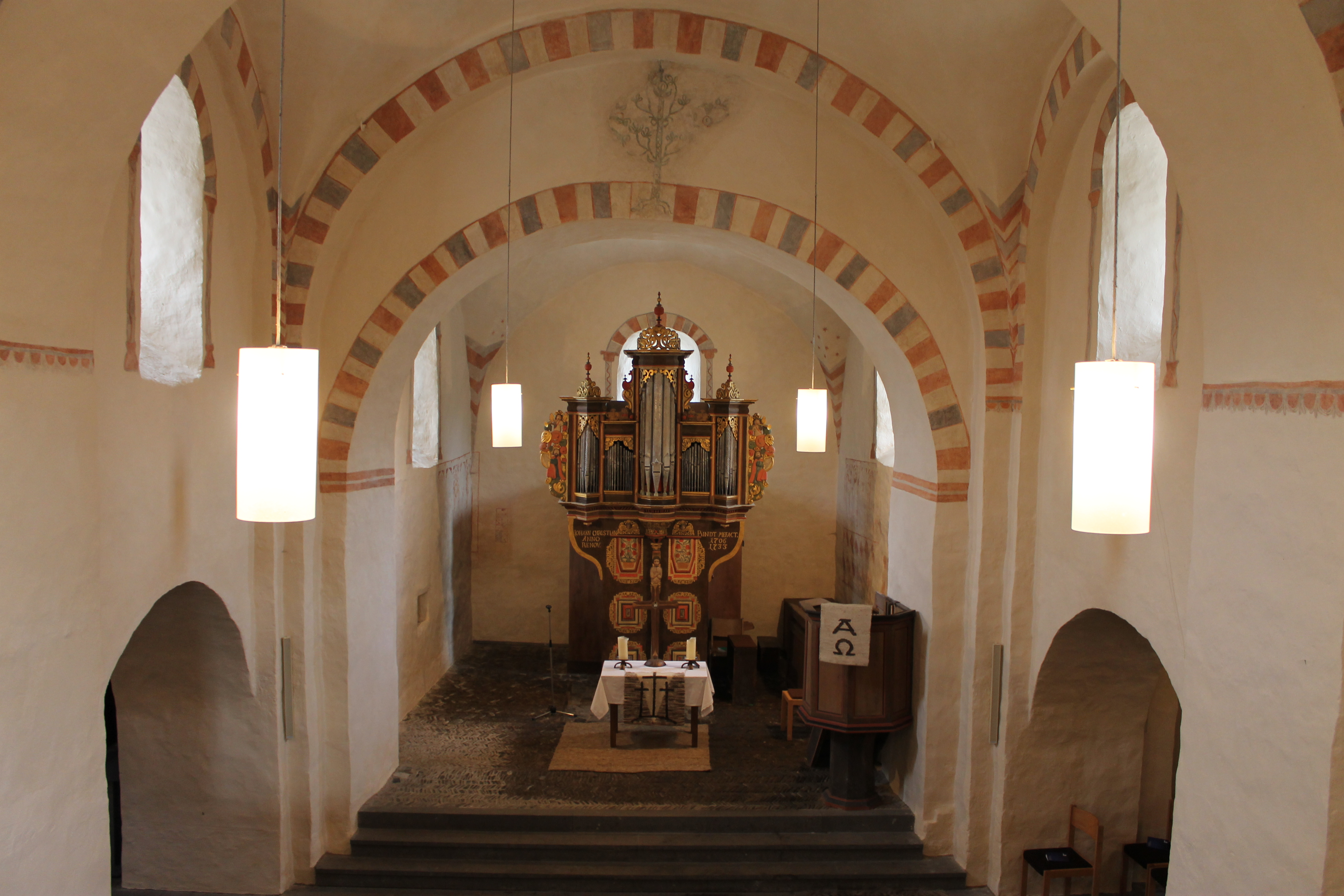 Innenraum der Emmauskapelle in Hatzfeld (Eder) mit der Orgel von Johann Christian Rindt